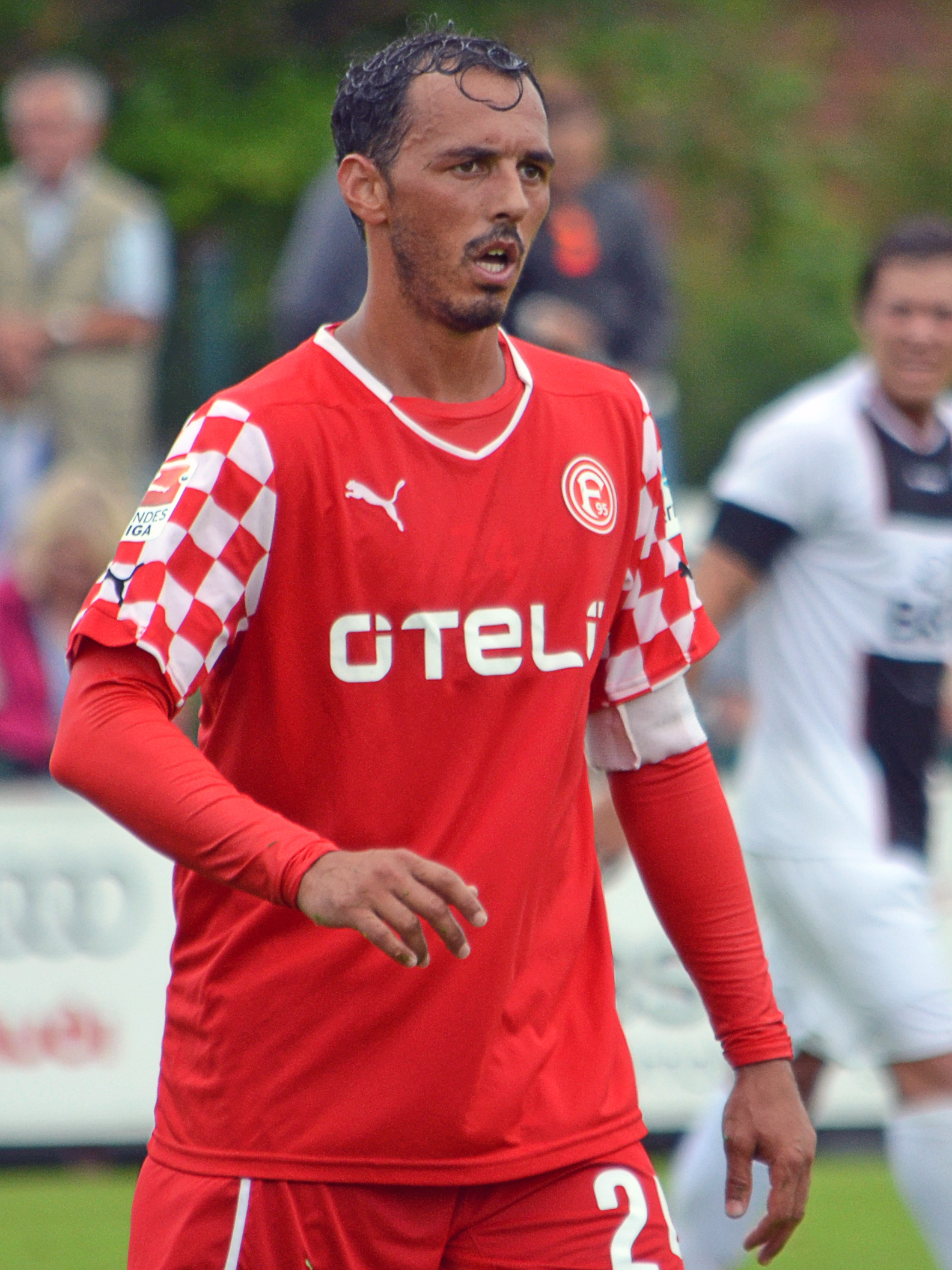 Sérgio da Silva Pinto, deutsch-portugiesischer Fußballspieler.